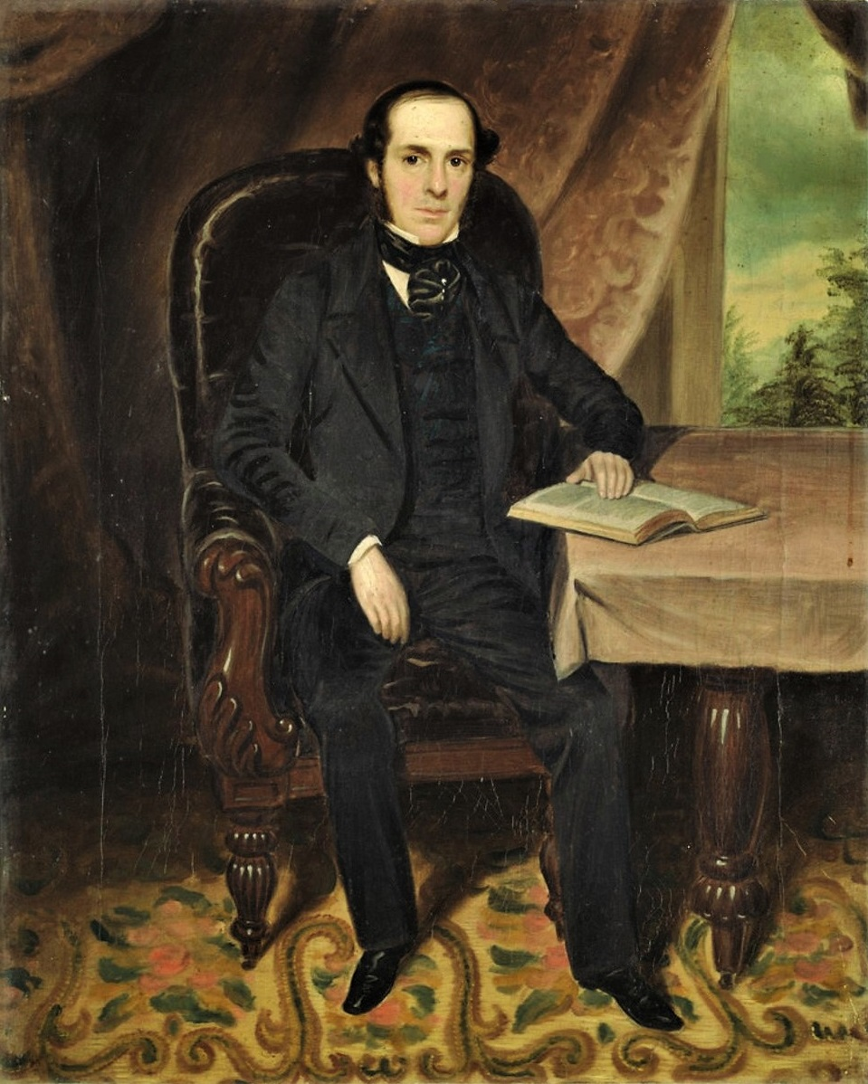 Joseph Knight Boswell, huile sur toile, 53,6 x 43,4 cm